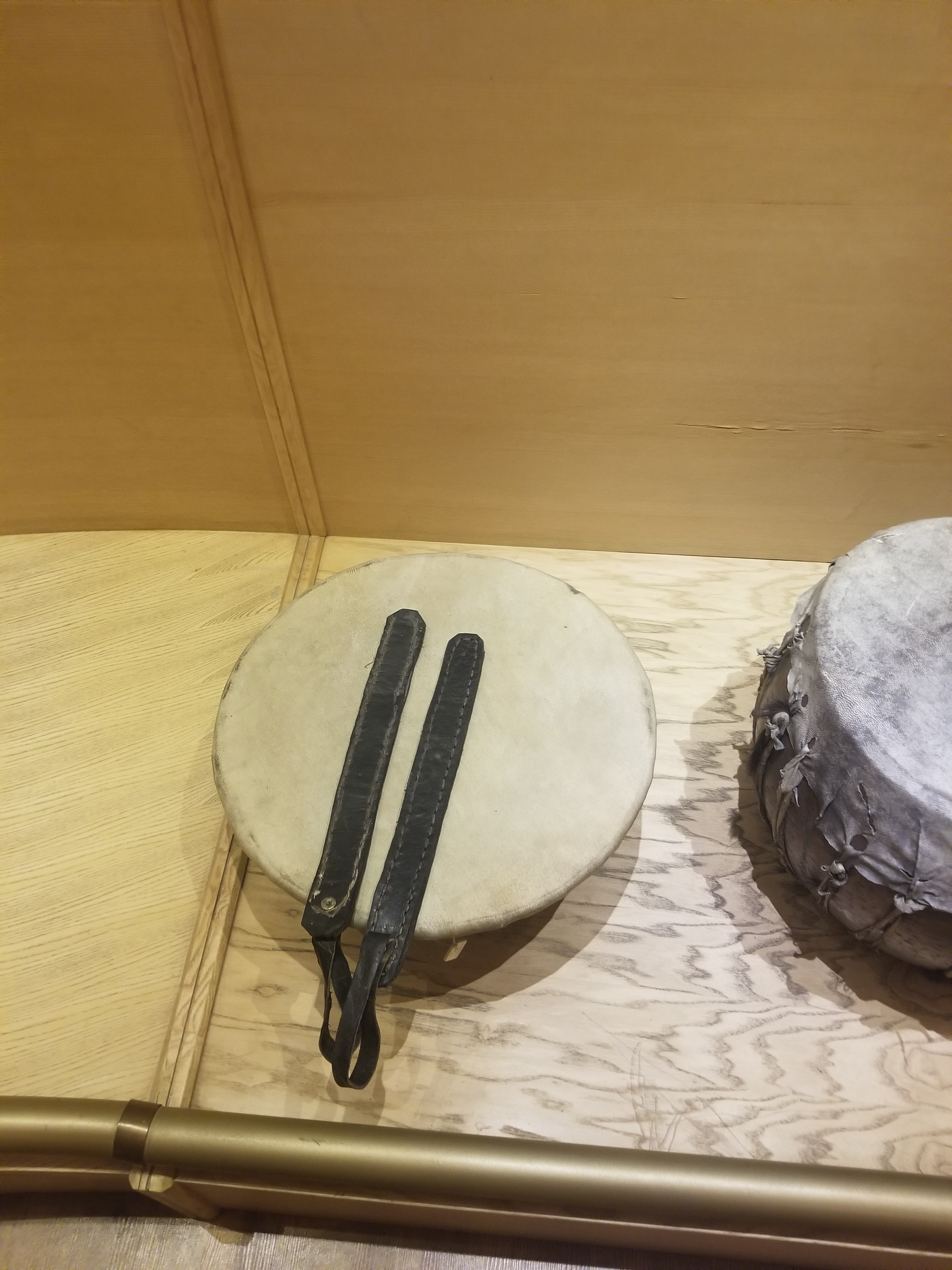 کوردی: تاس تەپڵی کوردی لە مۆزەخانەی مۆسیقای ئێران لە تاران